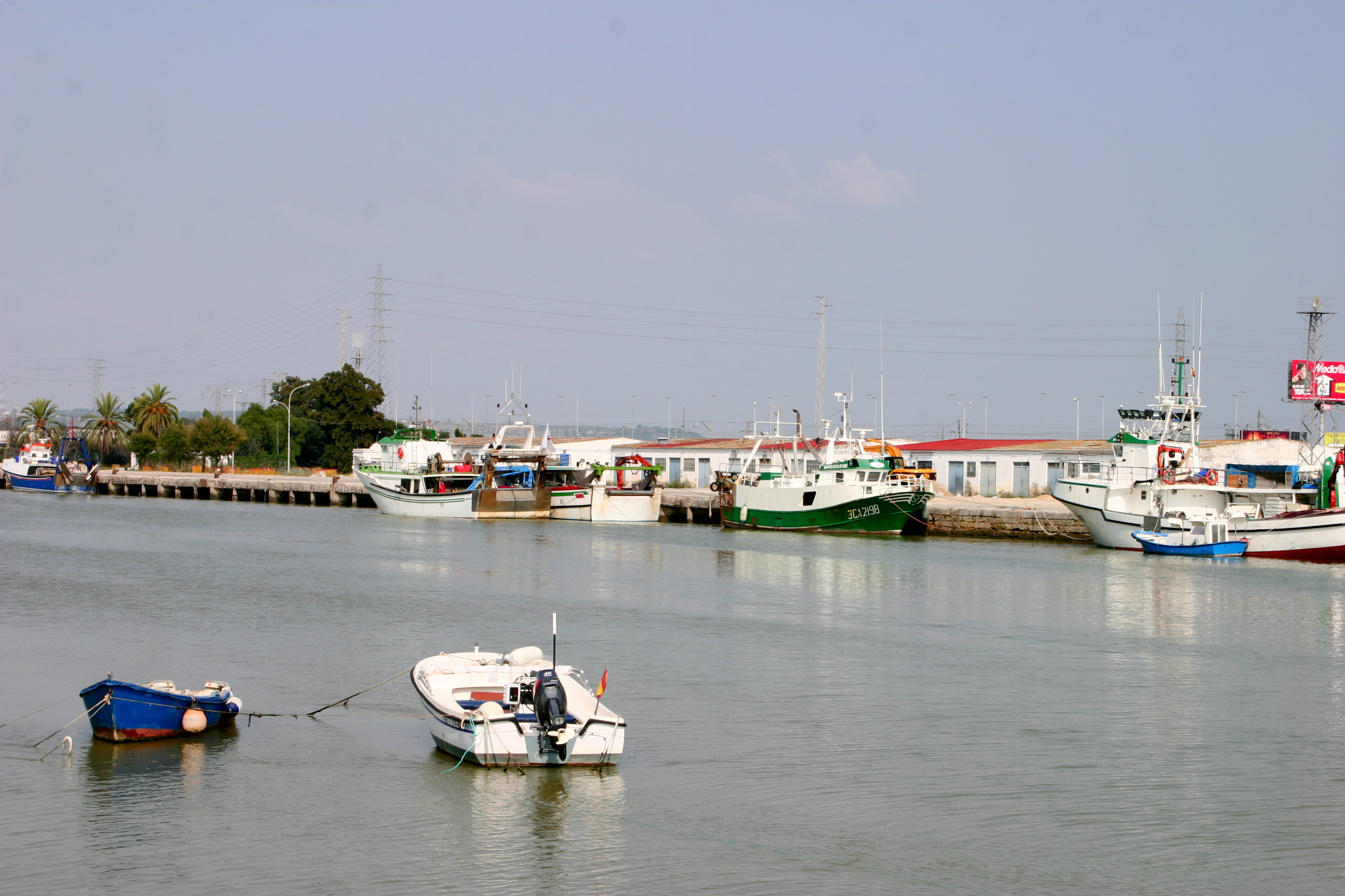 El Puerto de Santa María. Vista del Río Guadalete y el puerto pesquero.